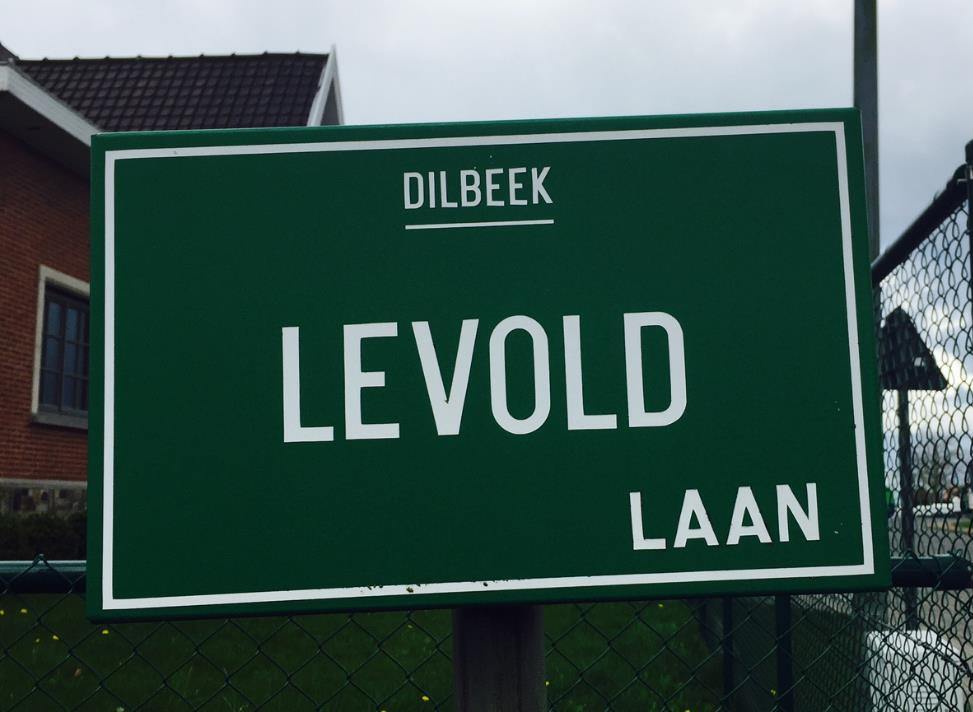 Straatnaam Levoldlaan in Dilbeek